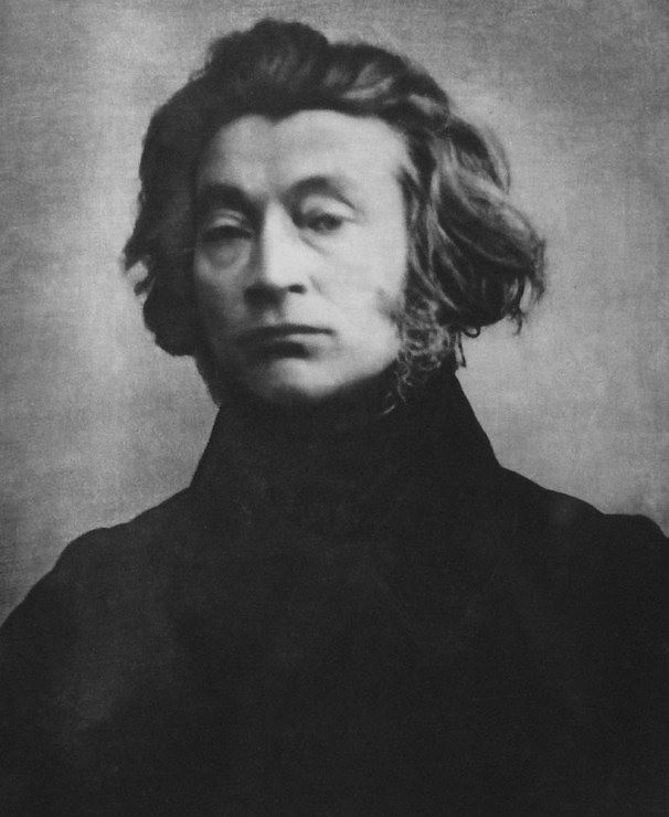 Adam Mickiewicz według dagerotypu paryskiego z 1842 roku